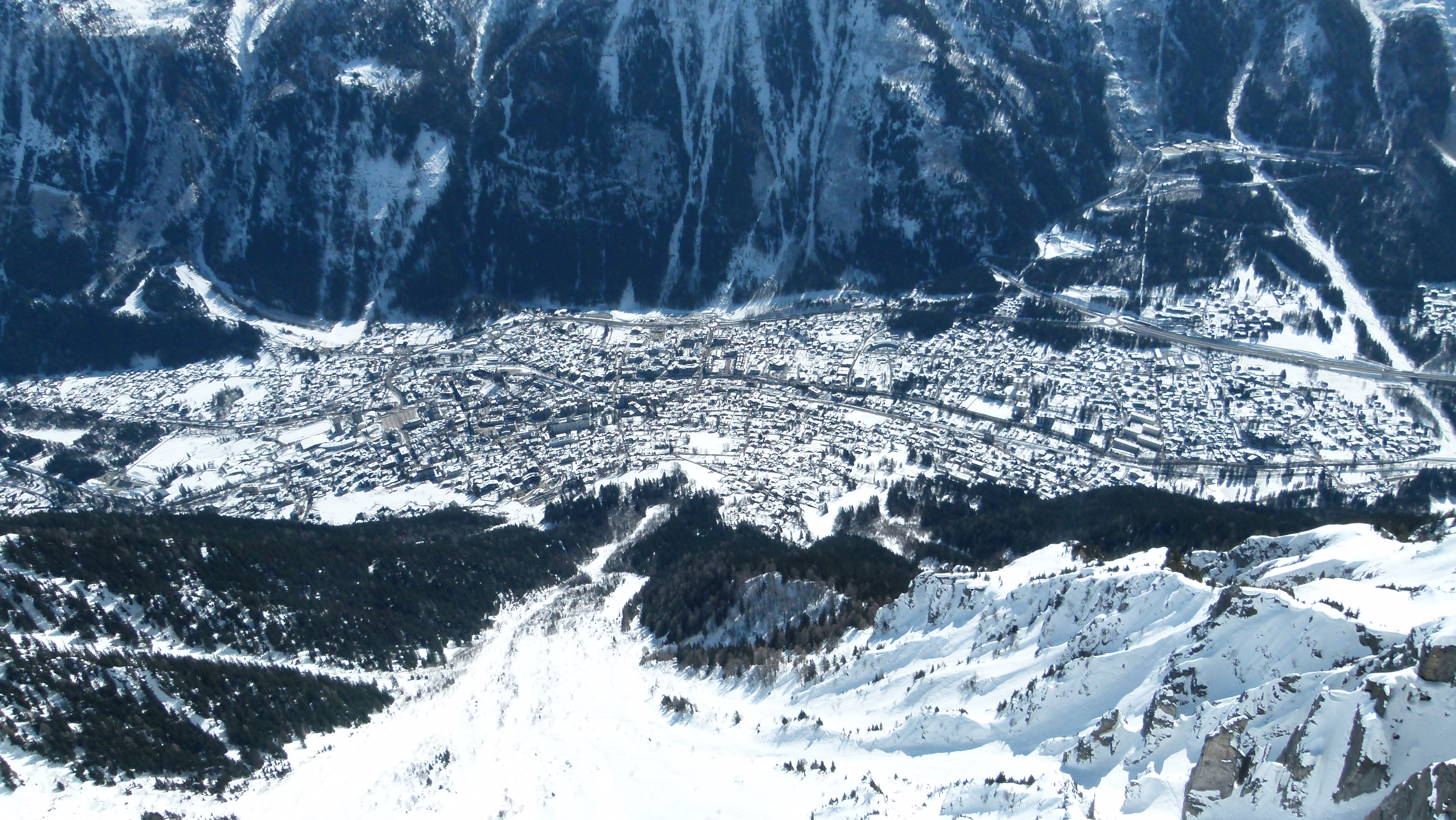 Blick auf Chamonix vom Brévent aus